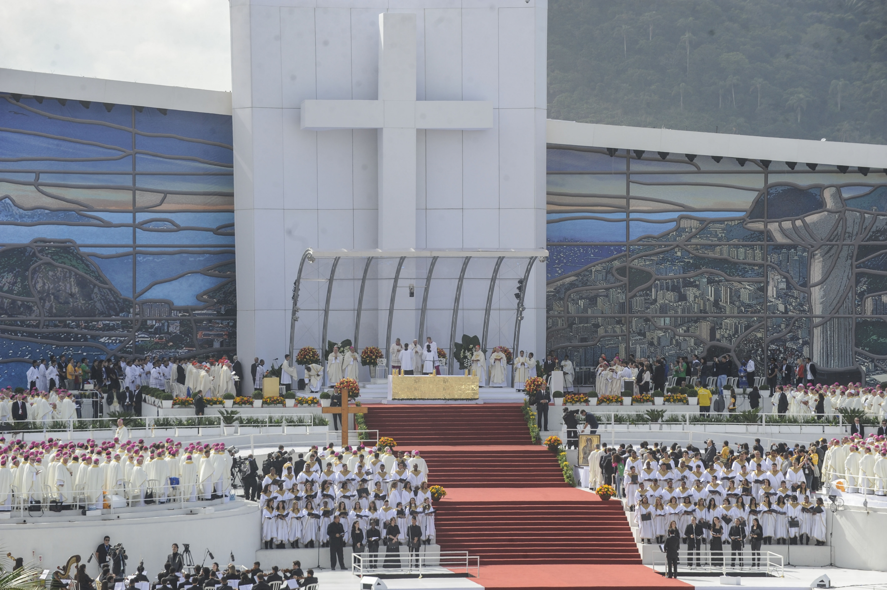 Rio de Janeiro – Um público que deve chegar a 3 milhões de pessoas, de acordo com a prefeitura do Rio, assiste o papa Francisco celebrar a Santa Missa pela 28ª Jornada Mundial da Juventude (JMJ), na praia de Copacabana